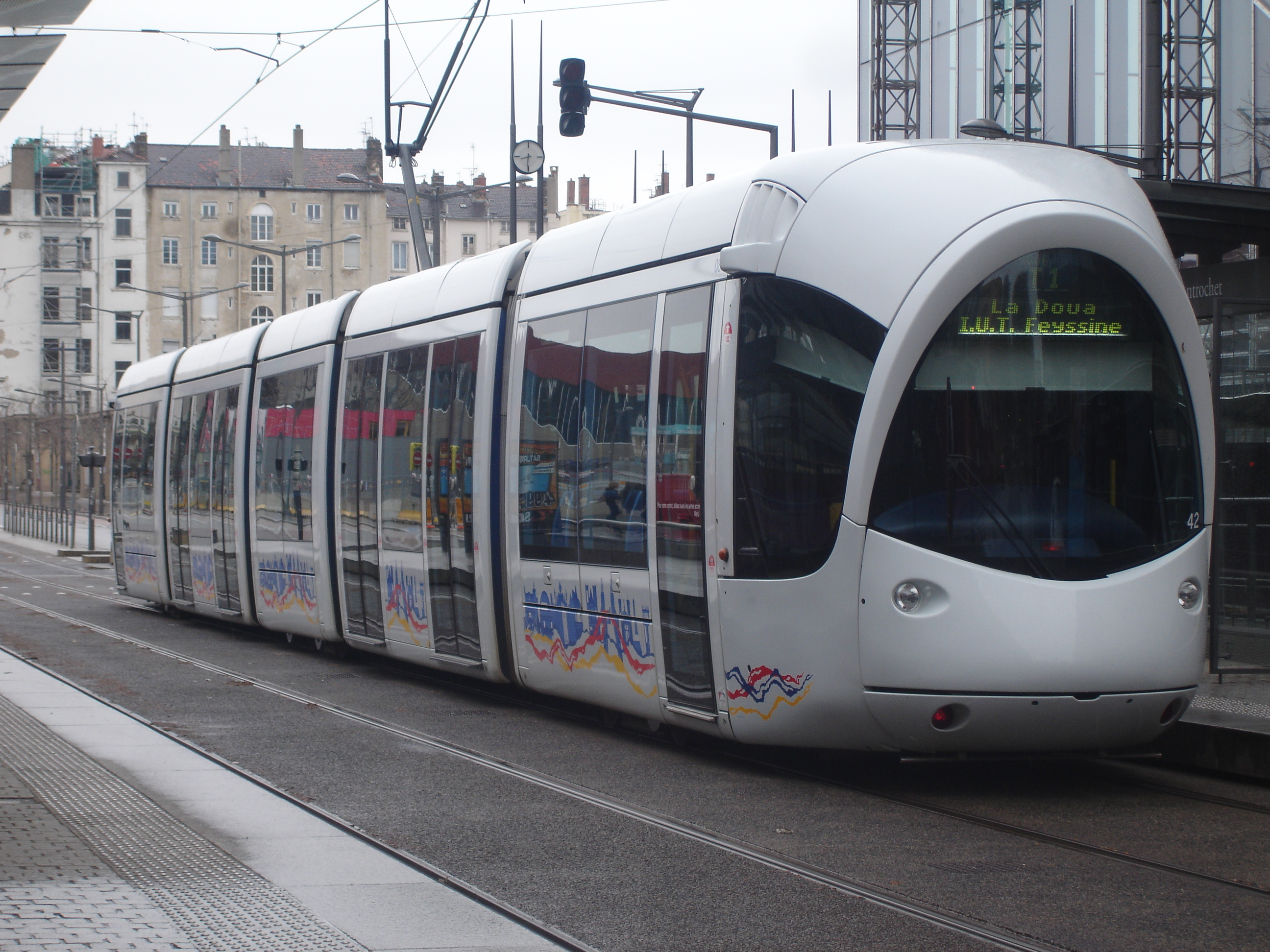 Confluence (Lyon) : terminus du tramway T1 à la station Montrochet